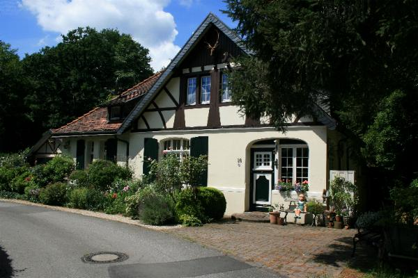 Forsthaus am Rakyweiher in Wegberg-Dalheim